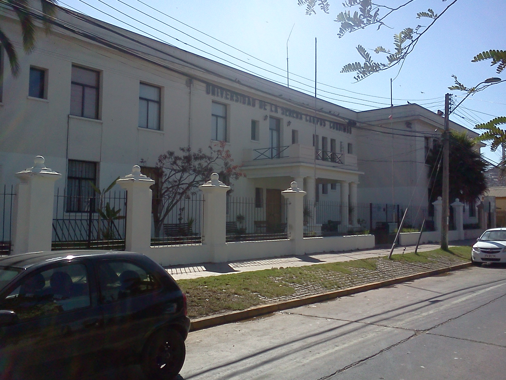 Ex- Instituto traumatologico de Coquimbo